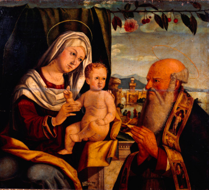 Filippo da Verona - Madonna con Bambino e Santo Vescovo 1505-1510 55 x 62 - olio su tavola Accademia Carrara - Bergamo